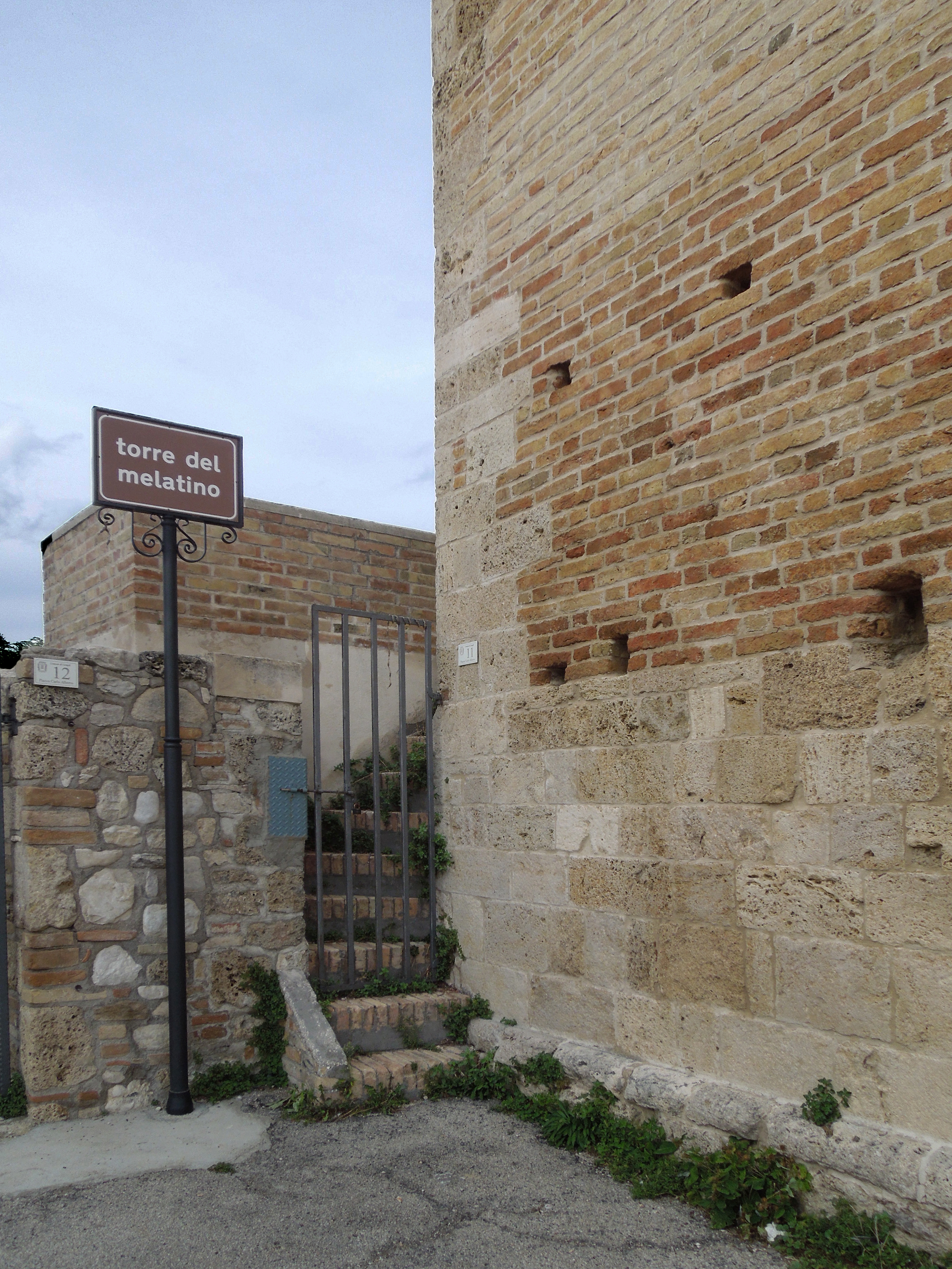 Scala esterna di accesso alla Torre del Melatino di Nocella di Campli in provincia di Teramo.